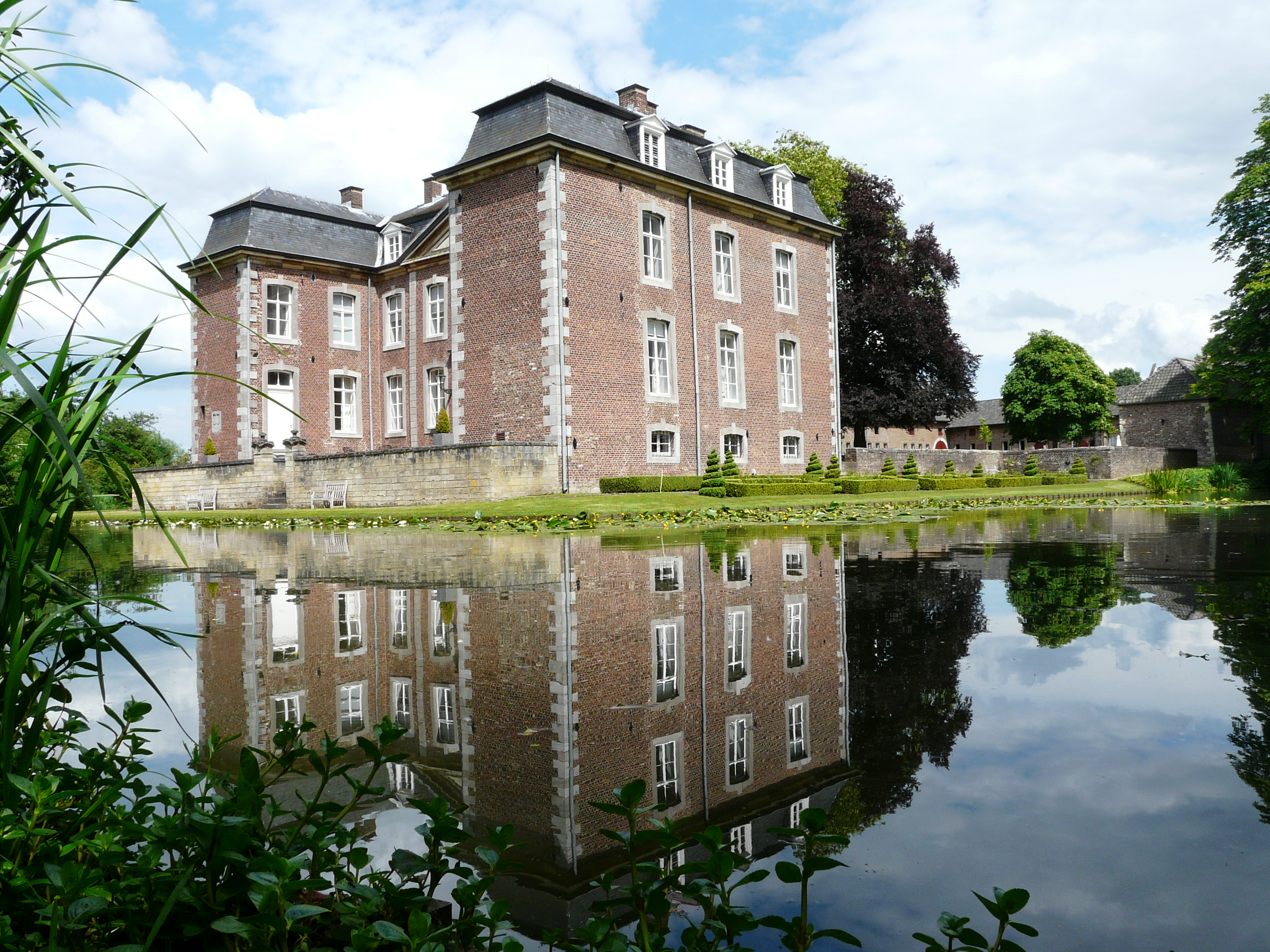 Impressie van kasteel Cortenbach te Voerendaal